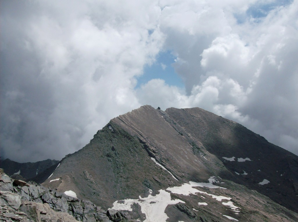 Monte Salza (alta Valle Varaita) visto dalla normale a Cima Mongioia.